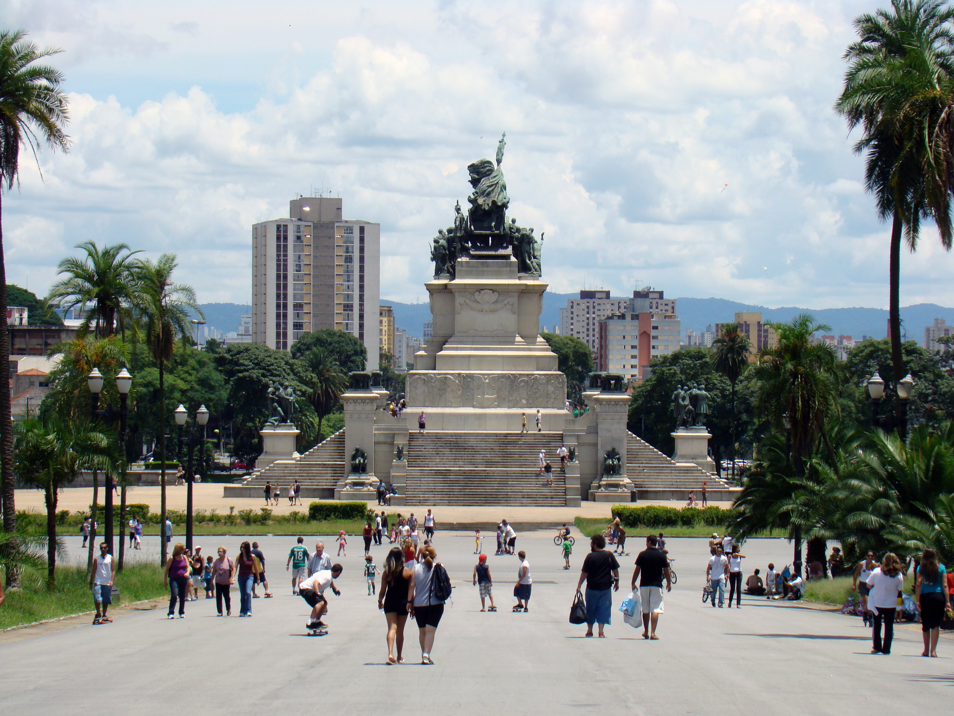 Monumento à Independência em São Paulo, Brasil.